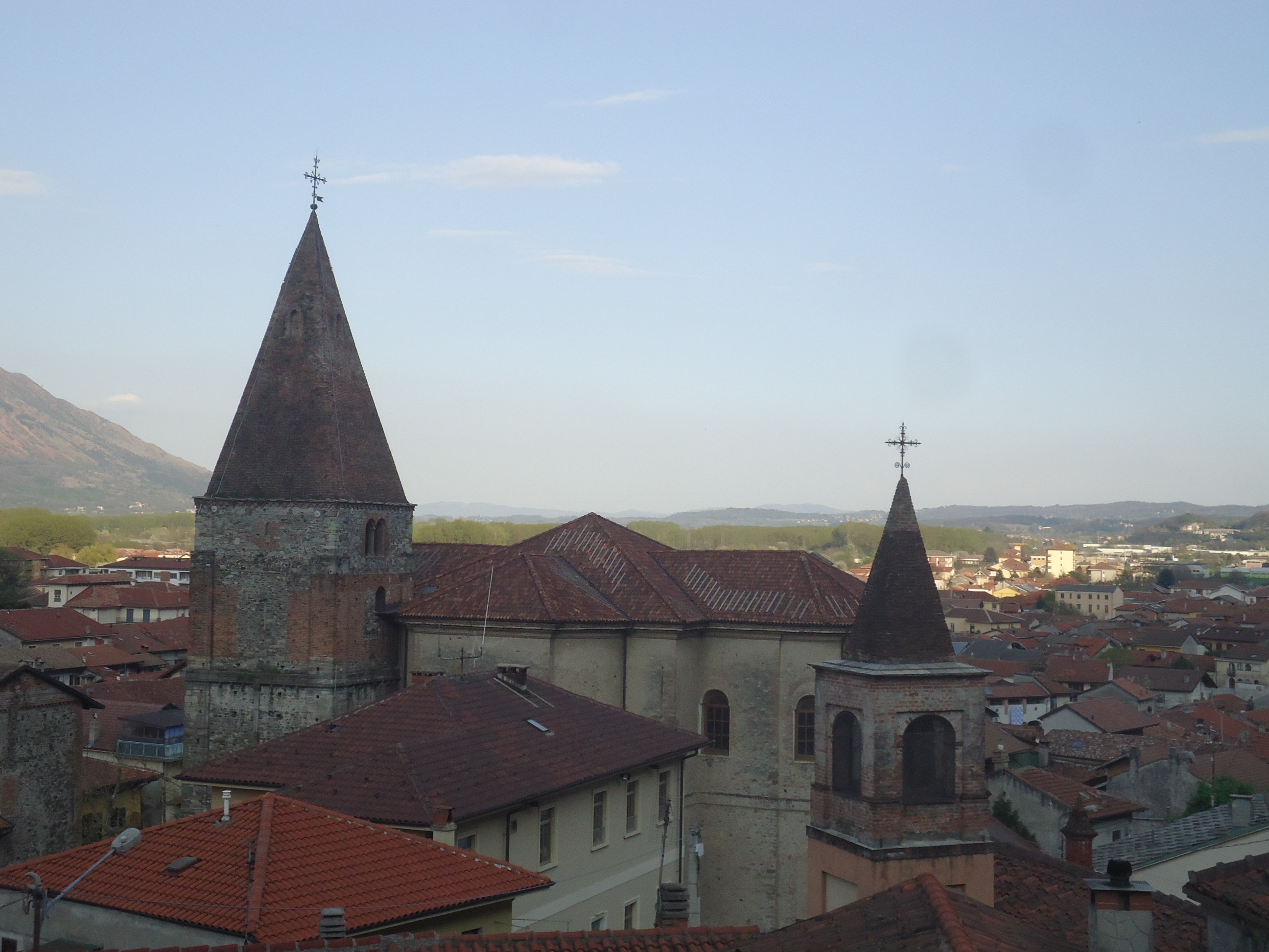 Chiesa parrocchiale vista da sudovest a Sant'Ambrogio (TO)